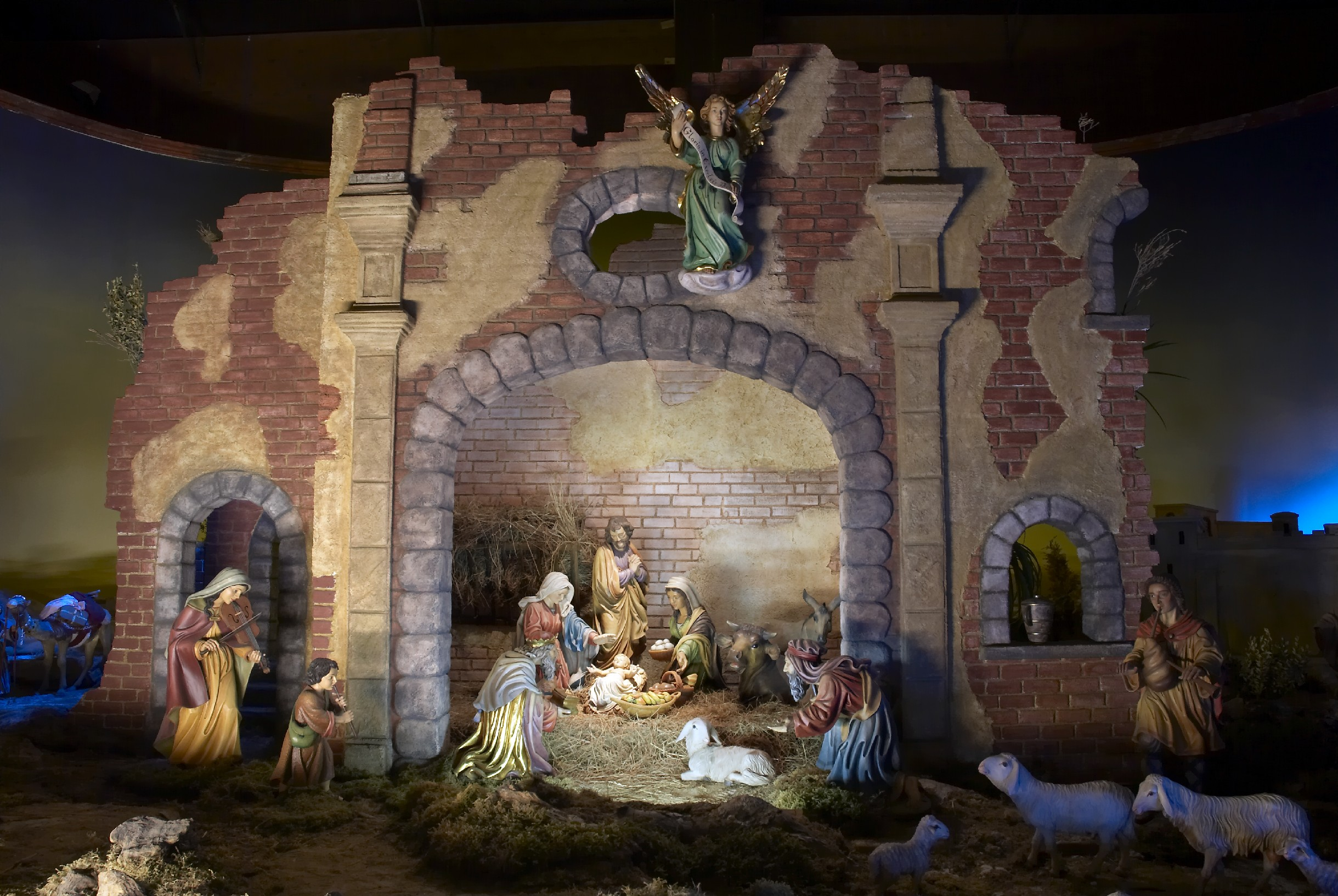 Beispiel einer Krippe in der ArsKRIPPANA